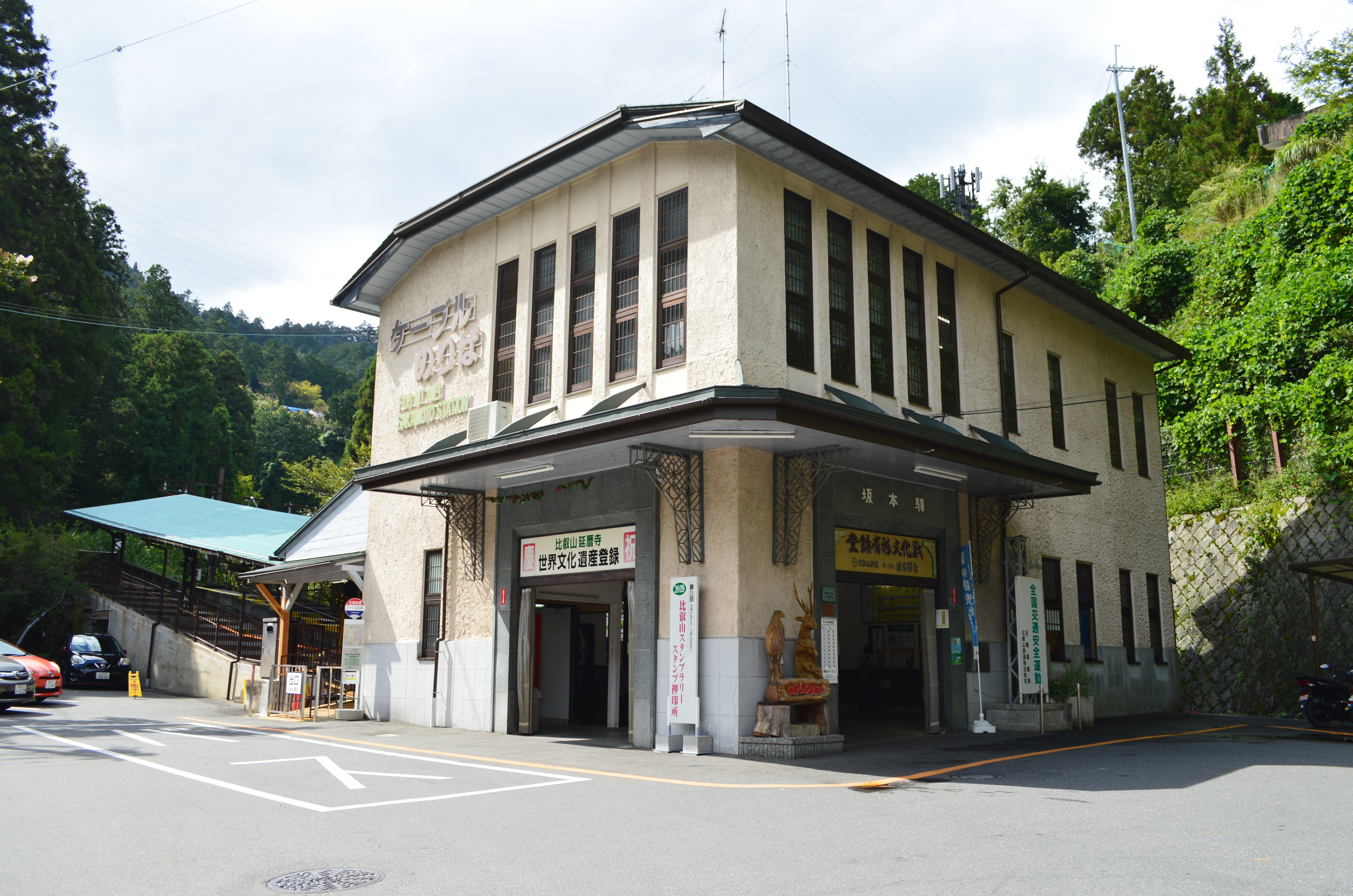 ケーブル坂本駅 駅舎